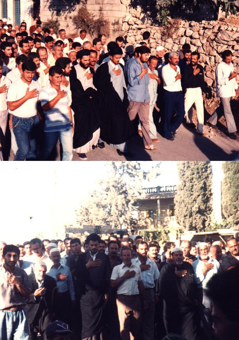 تجمعات دينية - بلدة عبا جنوب لبنان